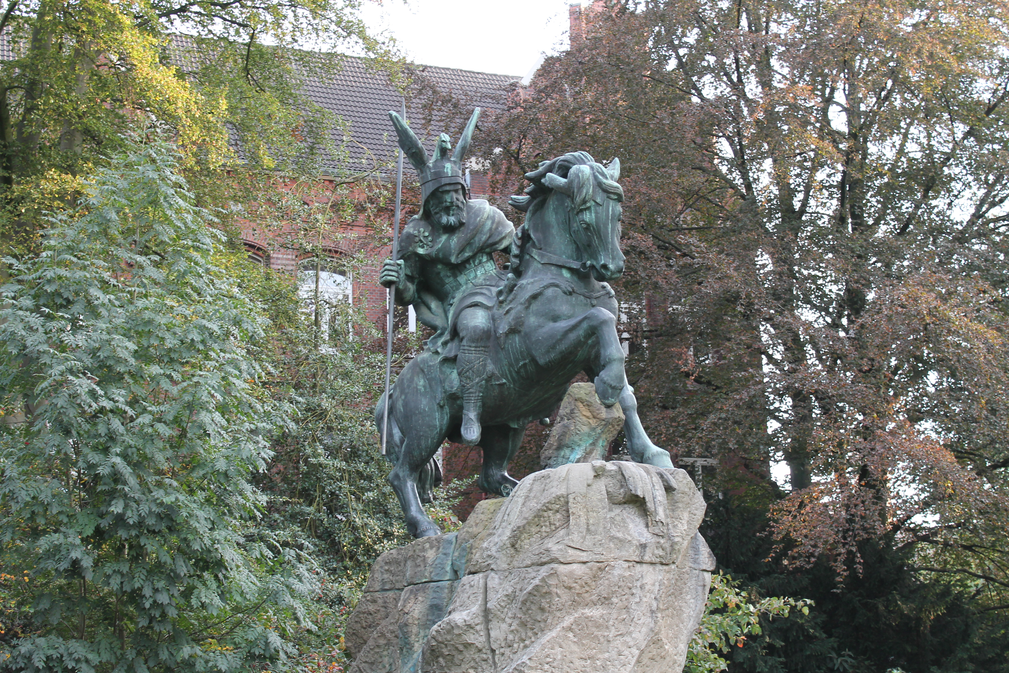 Herford, Baudenkmal 438